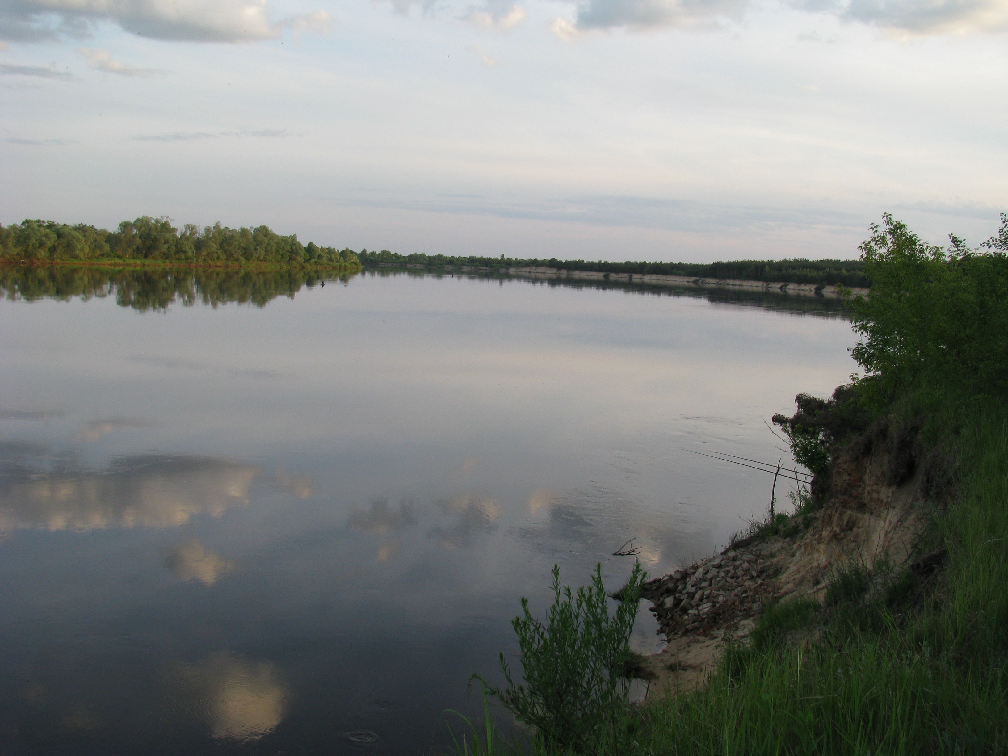 Открытие рыбацкого сезона на реке Днепр ( урочище- старое место пристани Бабки), близ деревни Жиличи Брагинского района Гомельской области